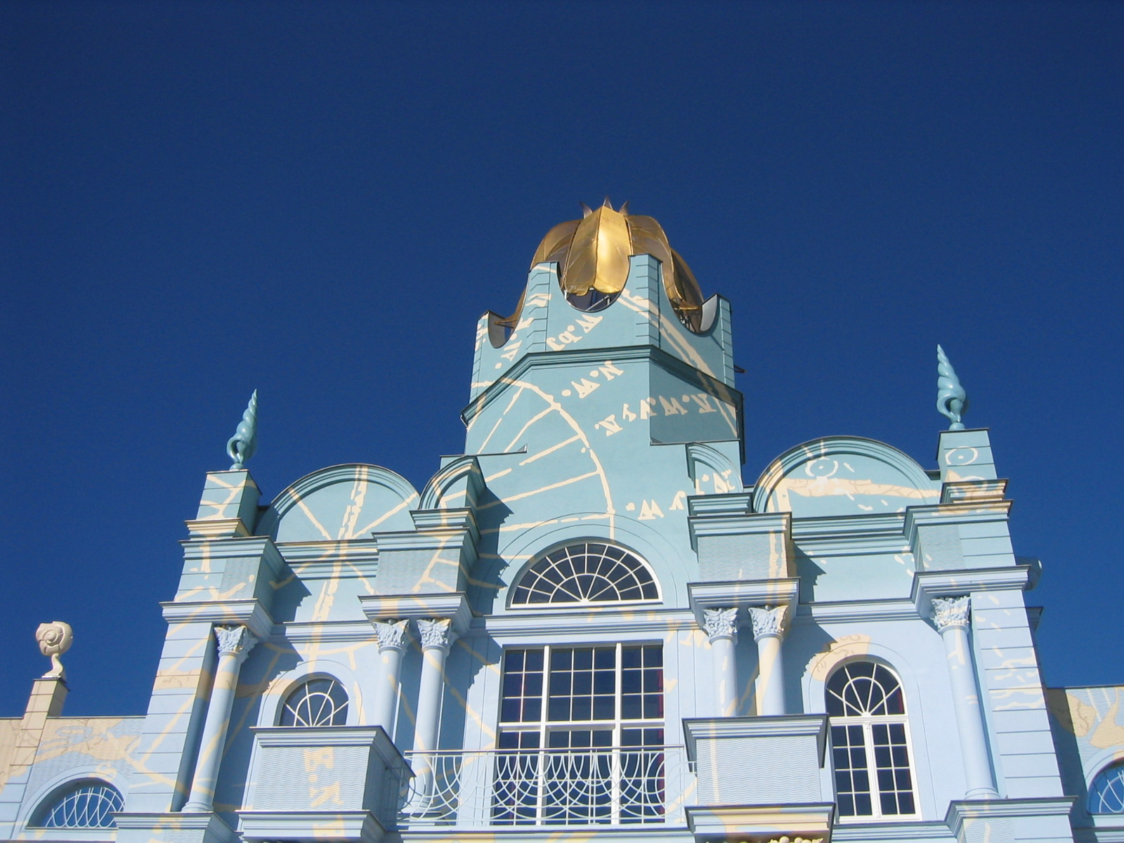 Eingangstor Belantis zur Eröffnung am 23.03.2003